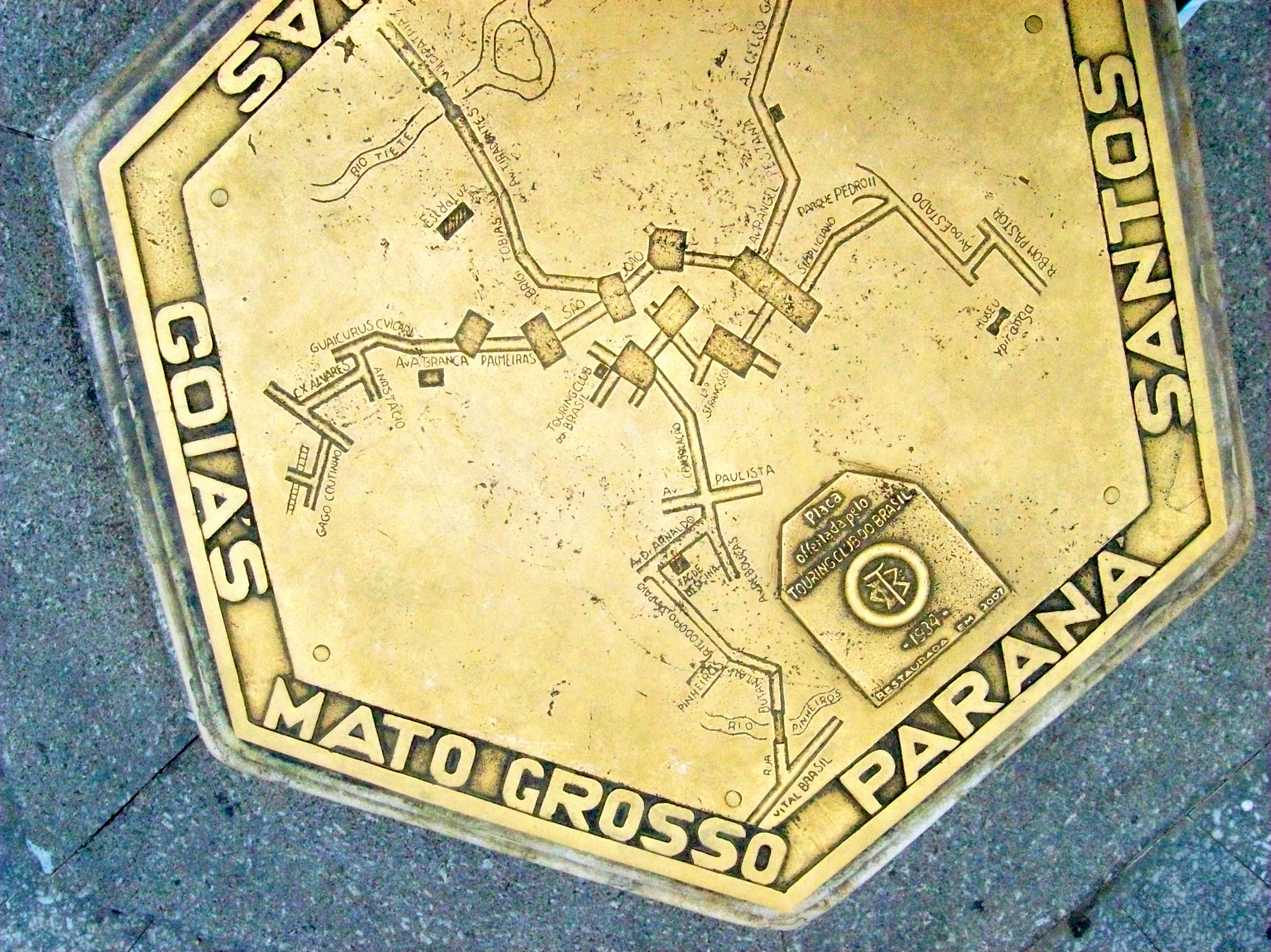 Foto superior do marco zero da cidade de são paulo, localizado na praça da sé, centro da cidade.